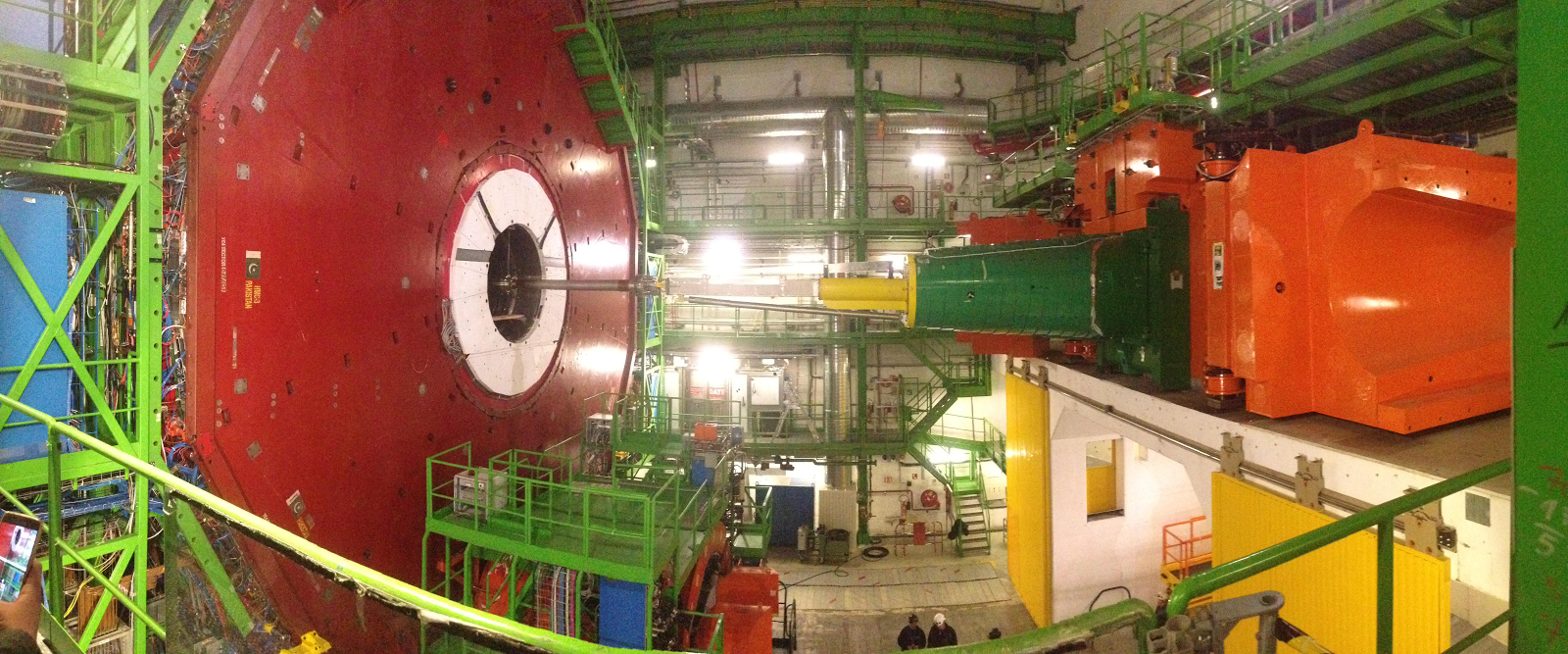 תמונה של CMS